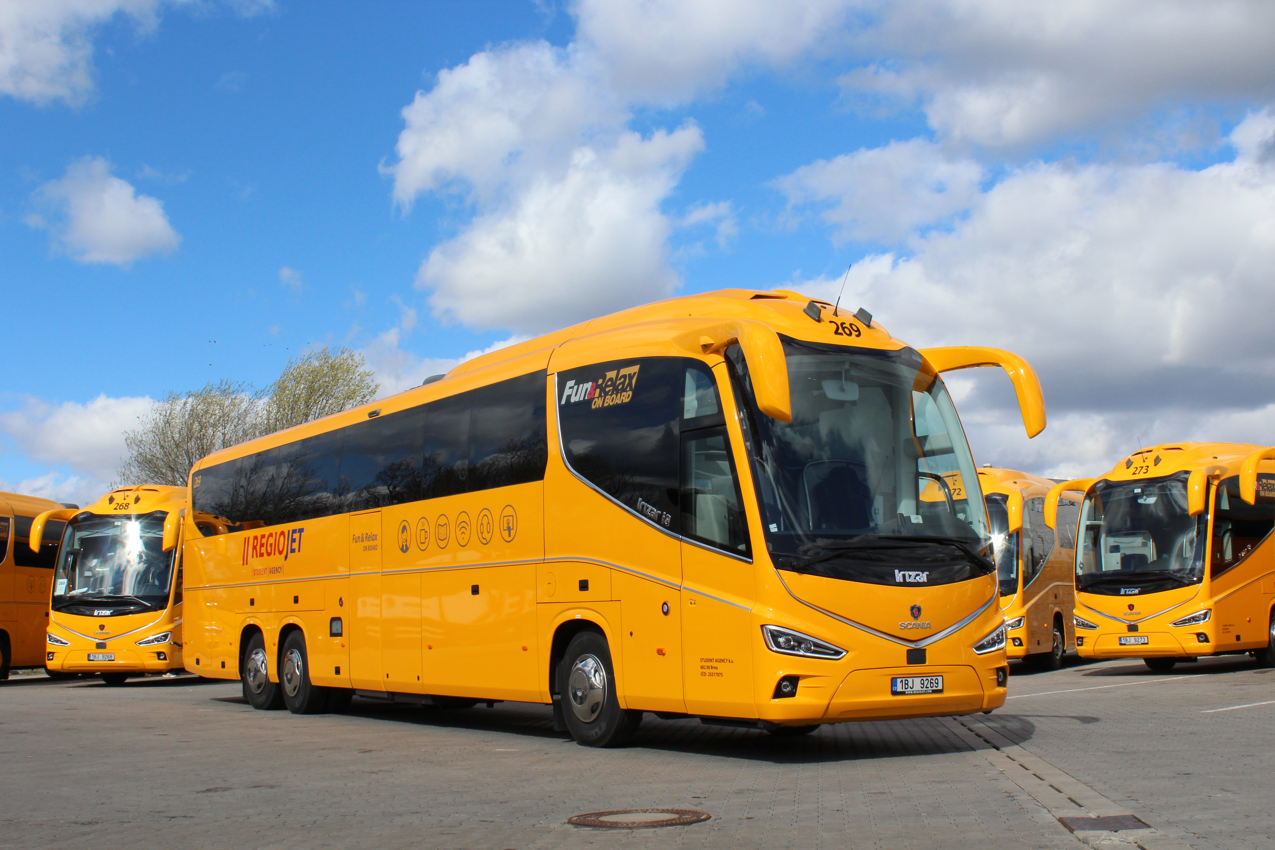 Autobus RegioJet